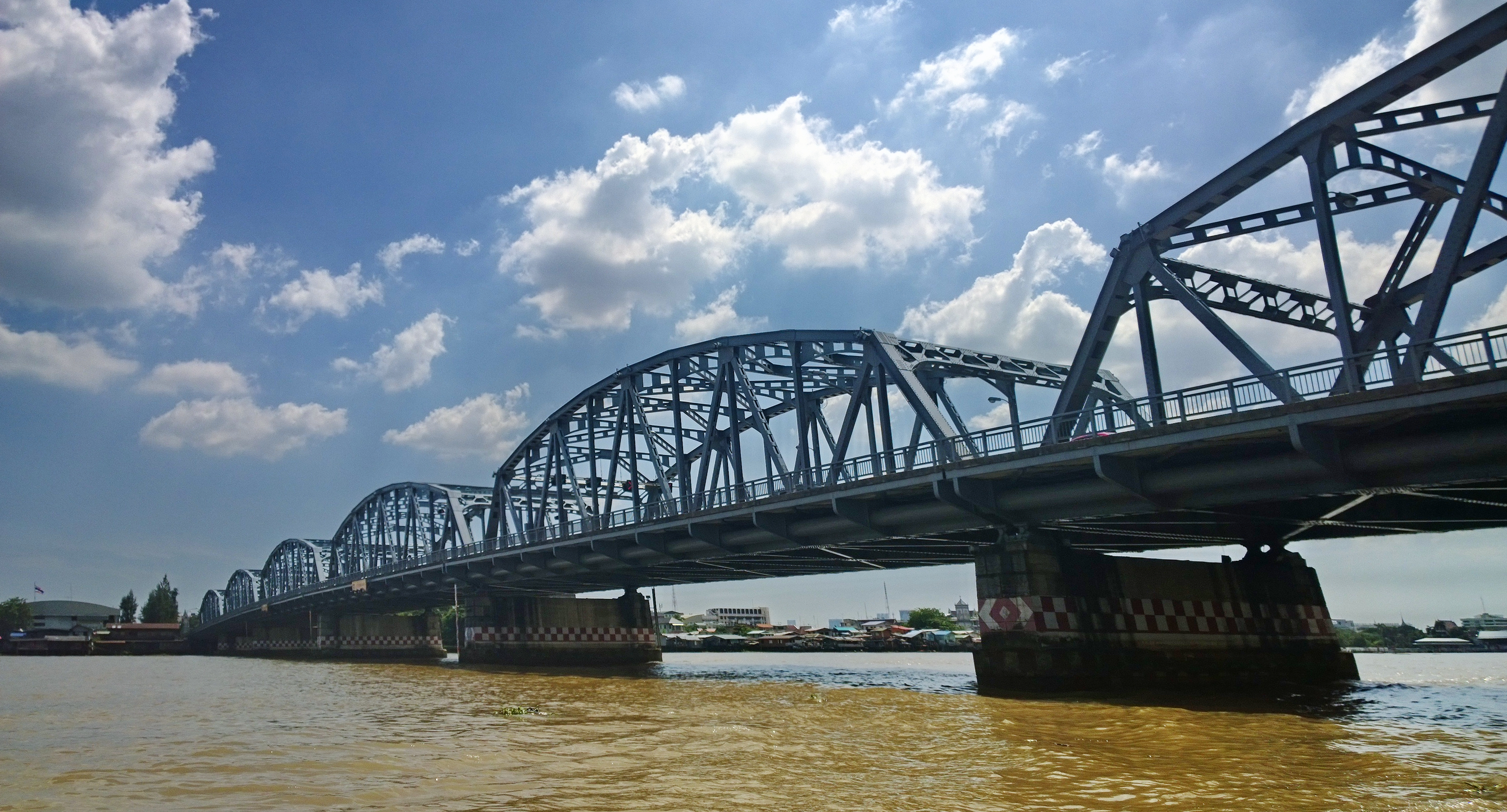 Watchawithi rd, Bang Phlat, bangkok, thailand